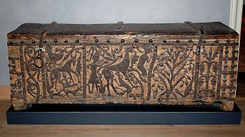 Rydaholmskistan. Statens historiska museum, inventarienummer 8963.